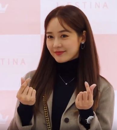 배우 성유리가 2일 오후 경기도 성남시 분당구 백현동에 위치한 현대백화점 판교점에서 한 브랜드 포토월 행사에 참석했다.